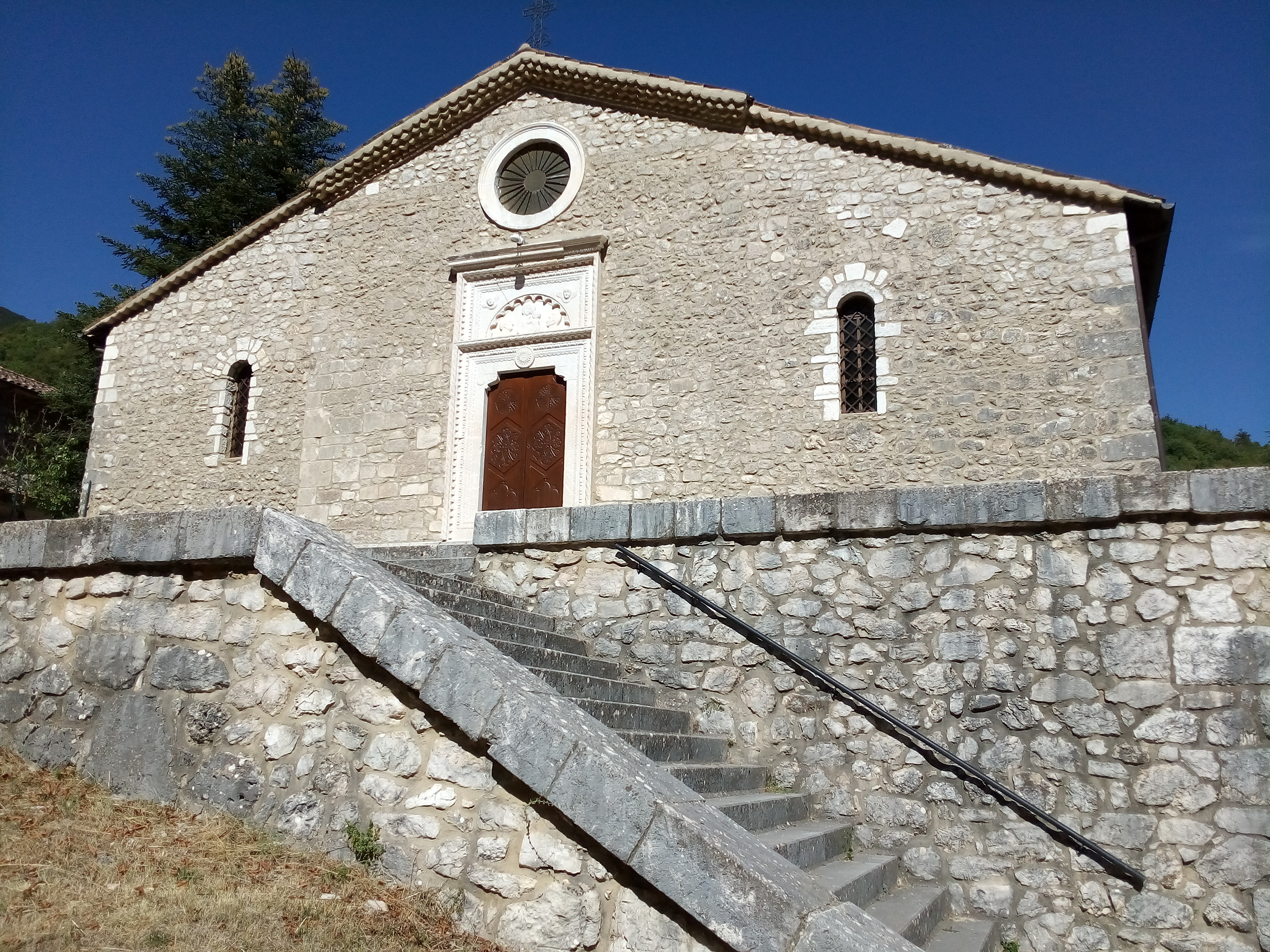 Chiesa della Madonna delle Grazie, Collelongo, Abruzzo